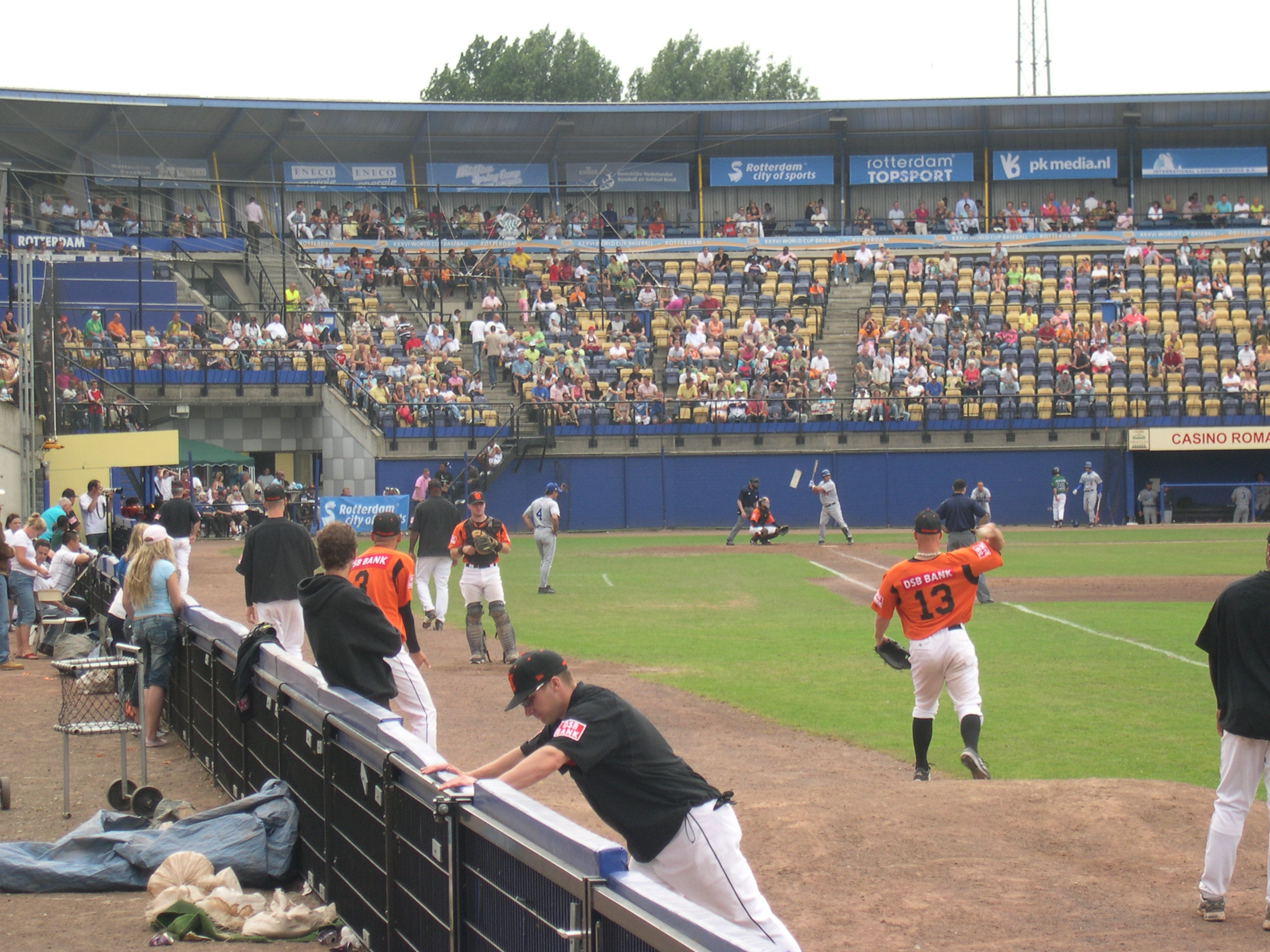 Het Nederlands honkbalteam in actie tijdens de European baseball series in een wedstrijd ten het Italiaans honbalteam. Eindstand van de wedstrijd 4-0 voor Nederland. Foto genomen door Magalhães op 9 juli 2006